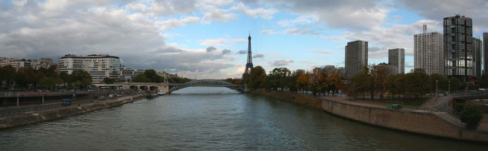 El barrio Grenelle, París.